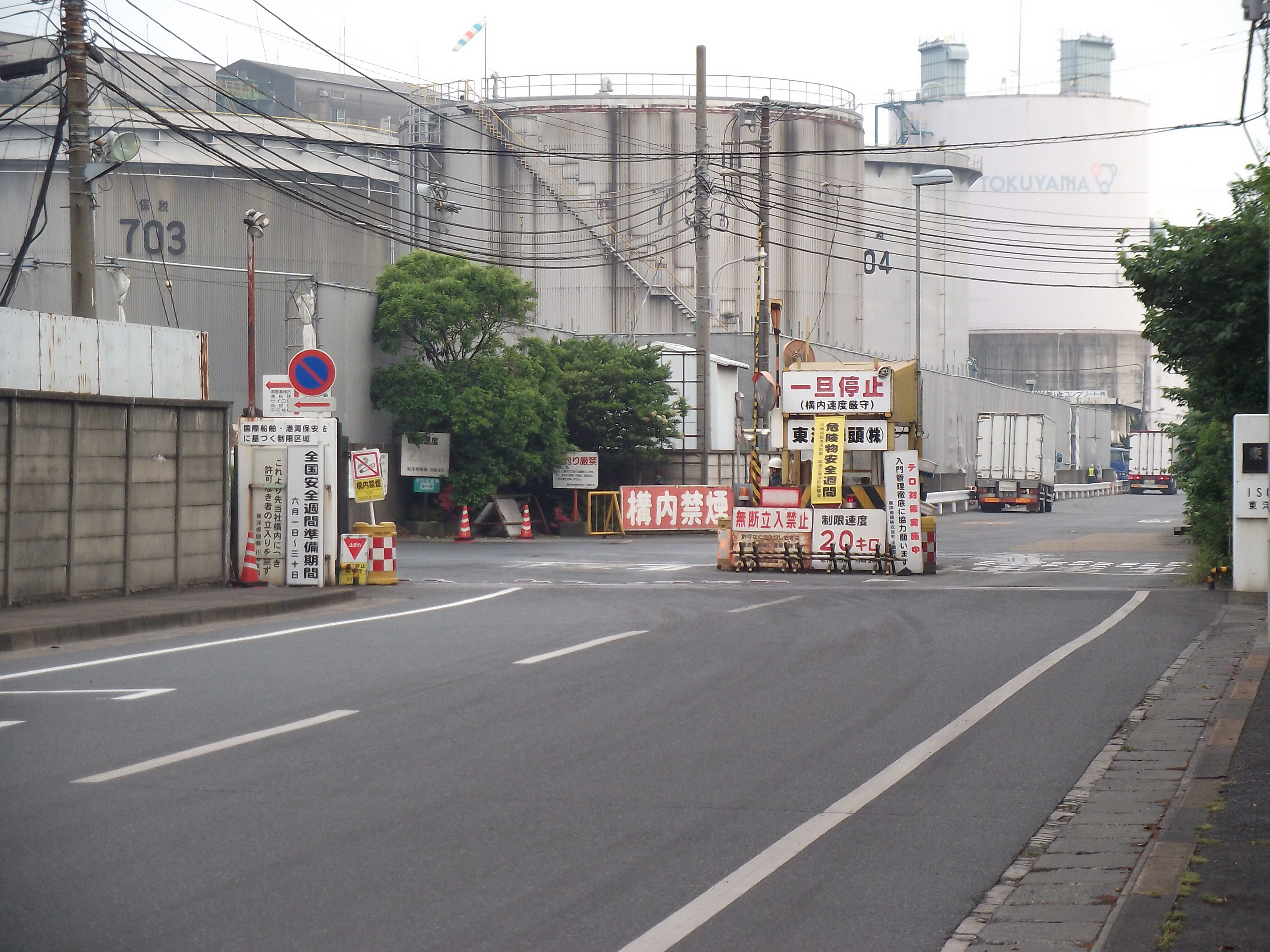 東洋埠頭川崎支店の入口。